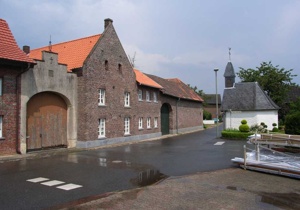 Summary Bildbeschreibung: Wockerath (Erkelenz). Quelle: eigenes Foto Fotograf/Zeichner: bodoklecksel (CEST) Datum: Juli 2006 Sonstiges